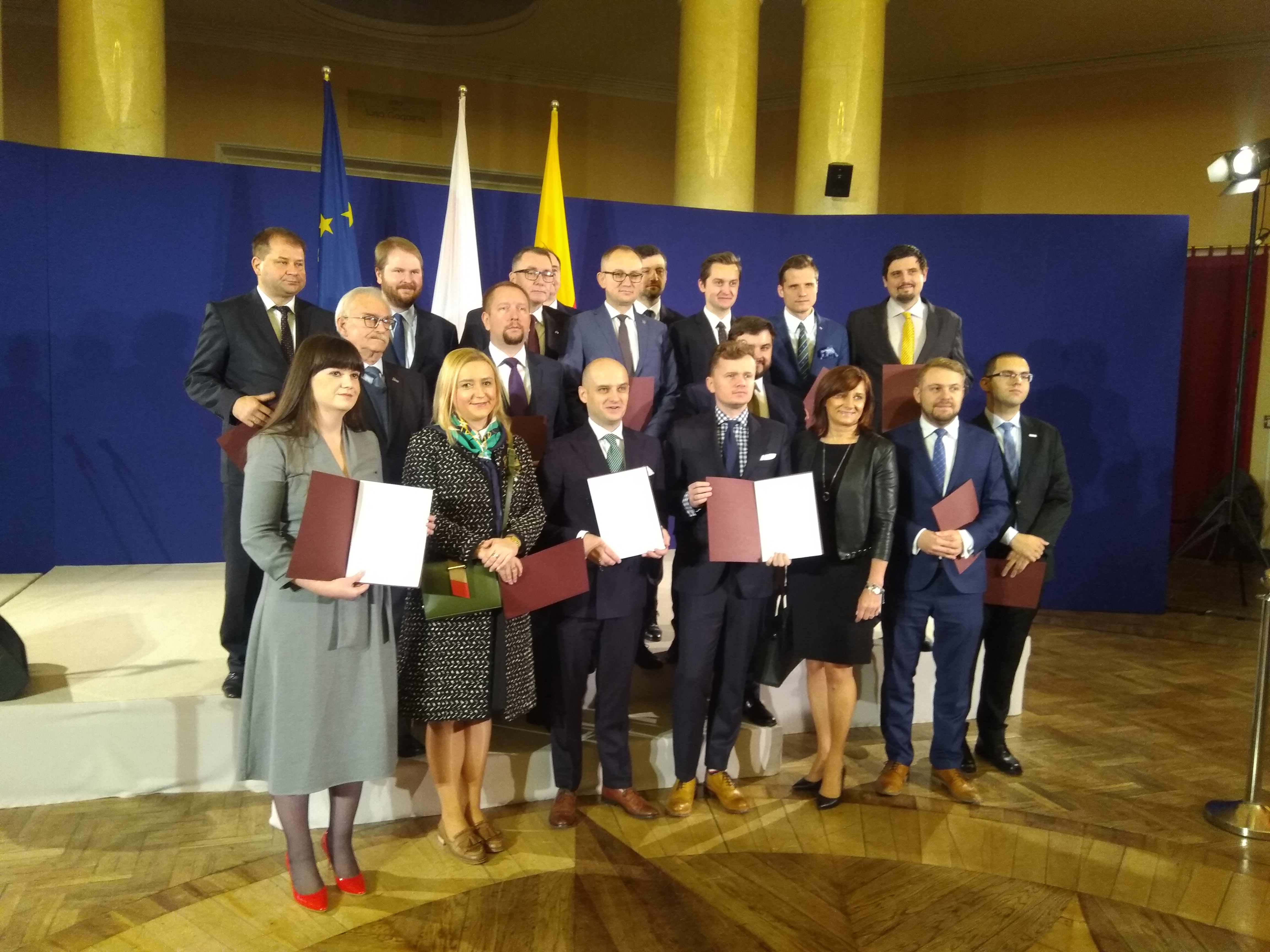 Od lewej 1. rząd: Monika Sobczak, Olga Semeniuk, Dariusz Lasocki, Oliwer Kubicki, Alicja Żebrowska, Jacek Ozdoba, Piotr Mazurekmiędzy rzędami 1. i 2.: Michał Szpąndrowski2. rząd: Andrzej Kropiwnicki, Patryk Górski, Błażej Poboży, Sebastian Kaleta, Maciej Binkowski, Wiktor Klimiuk3. rząd: Jacek Cieślikowski, Tomasz Herbich, Cezary Jurkiewicz, Dariusz Figura, Filip Frąckowiak